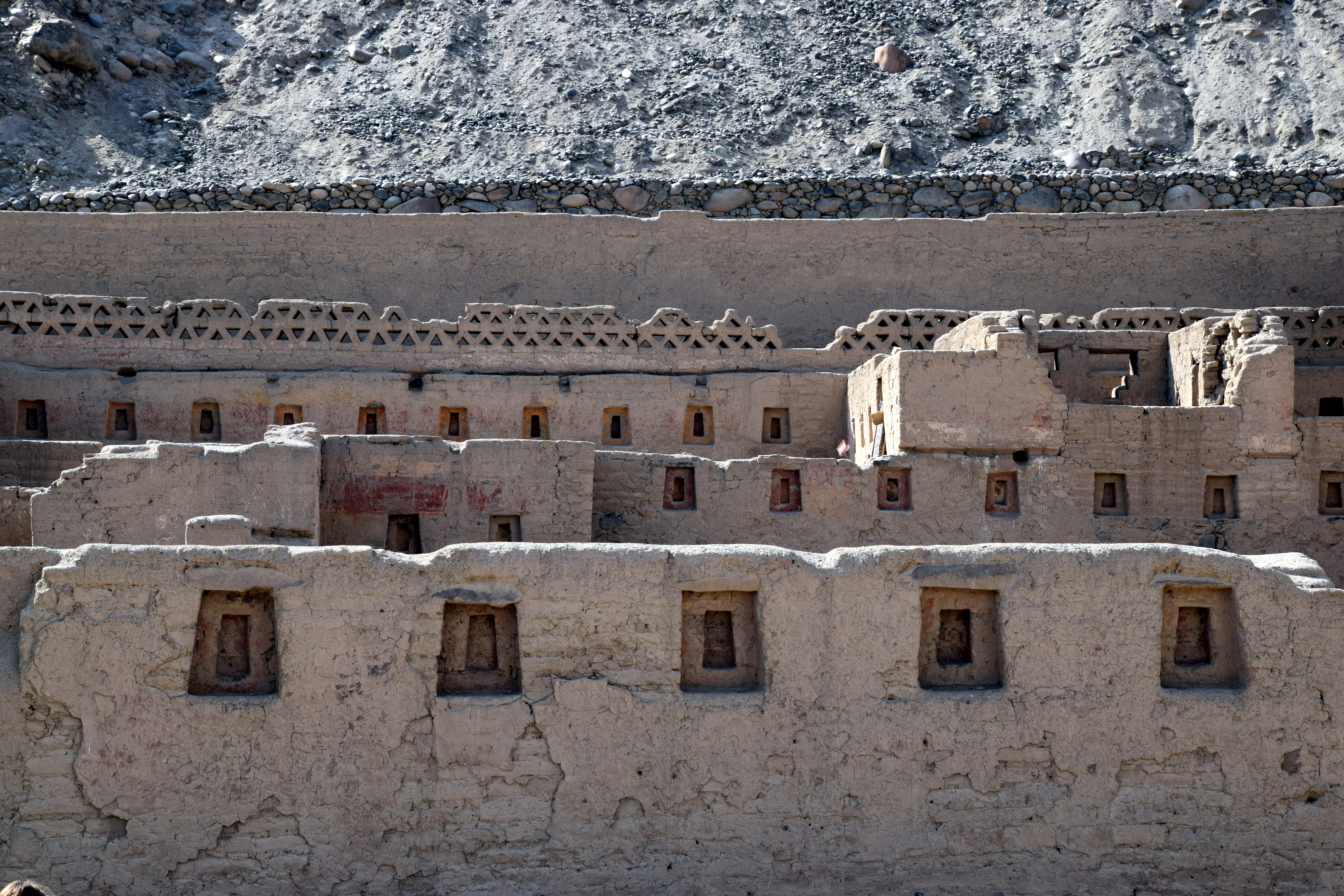 Tambo Colorado